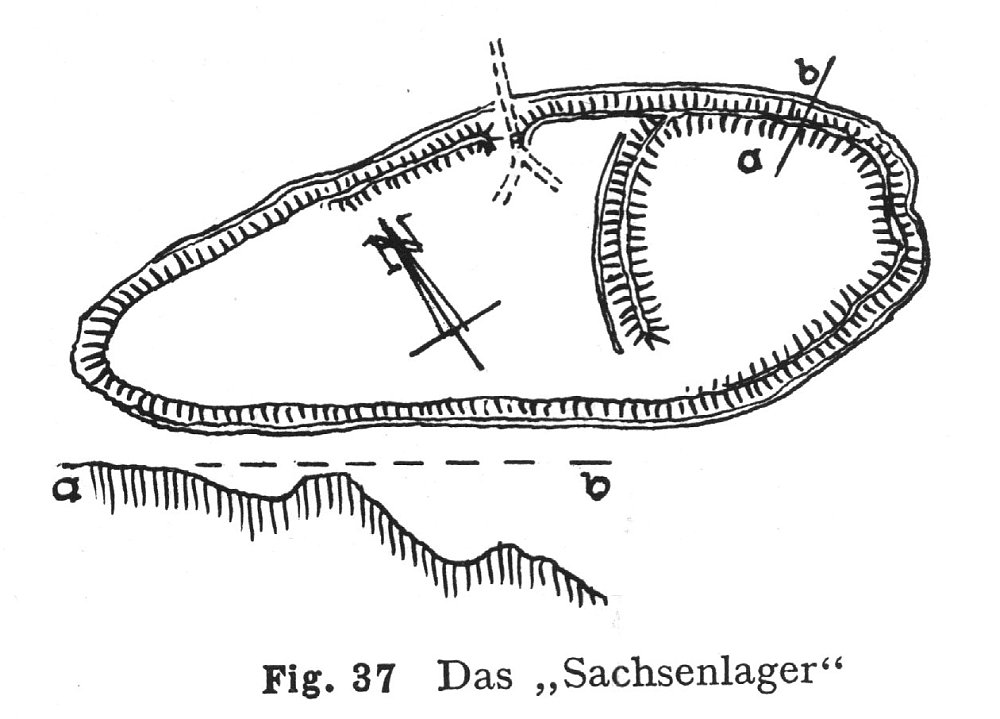 "Sachsenlager", auch "Römerschanze" bei Sierhausen